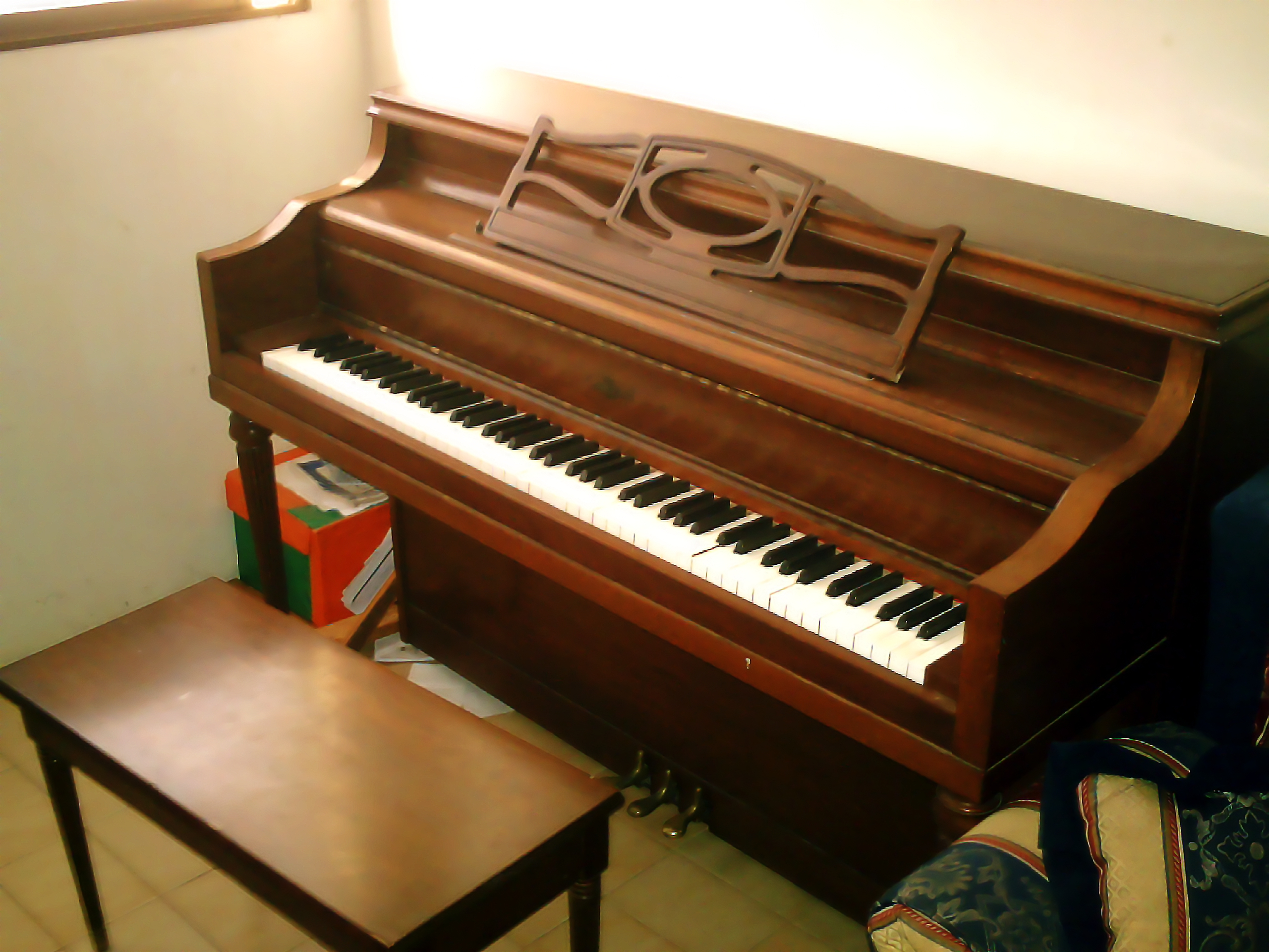 Vertical piano